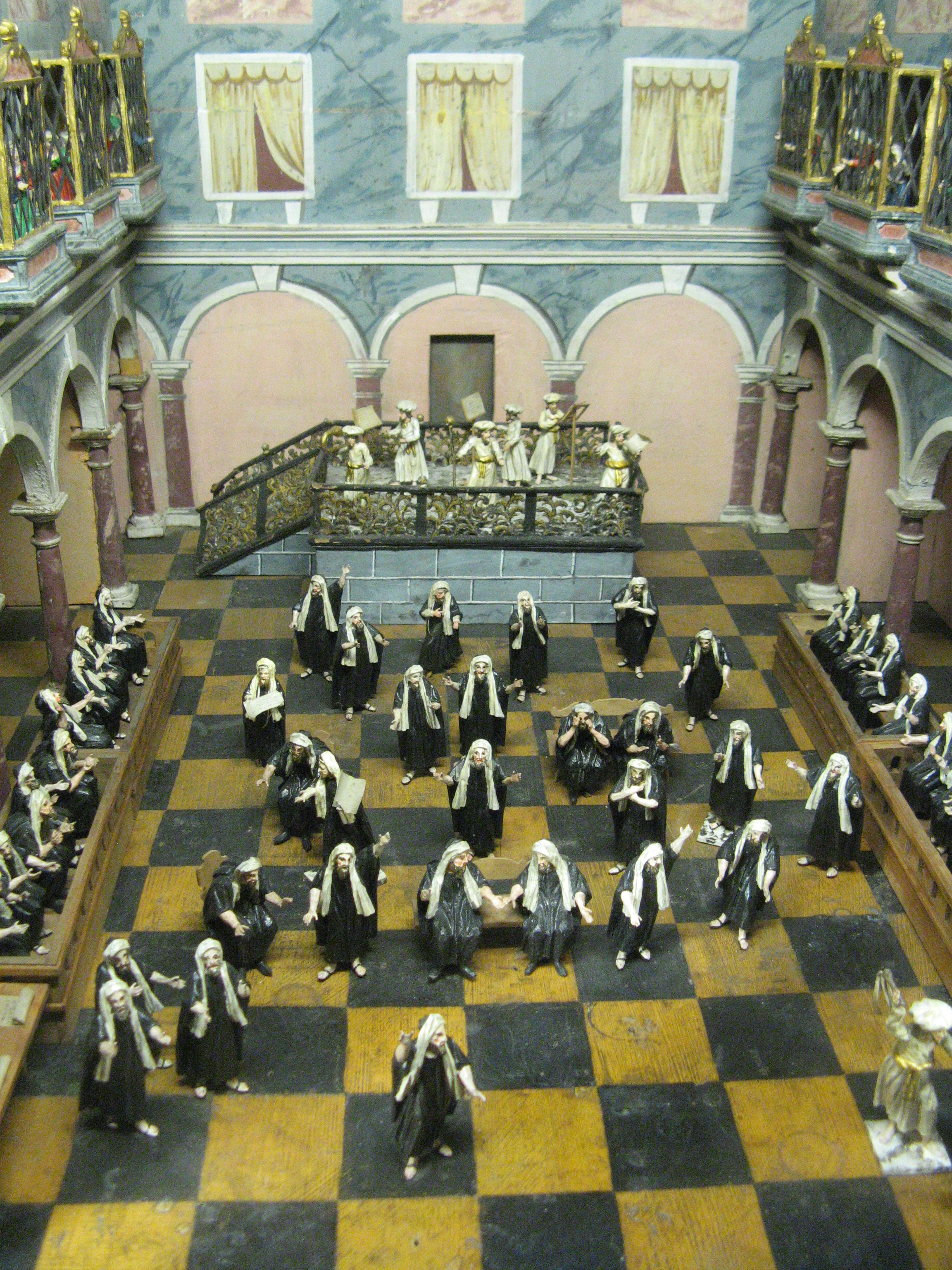 Augustin Alois Probst: Sabbathgebet in der Synagoge, Krippenmuseum Brixen